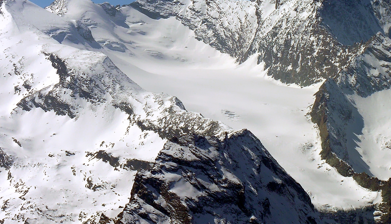 Il ghiacciaio del Trajo - Alpi Graie - Italy